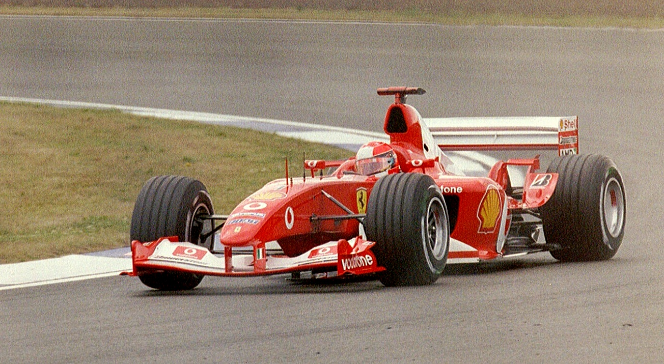 2003 British Grand Prix, Silverstone Circuit.